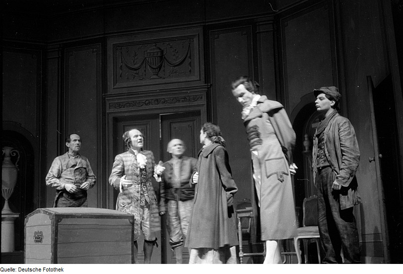 Original image description from the Deutsche Fotothek Szenenbilder